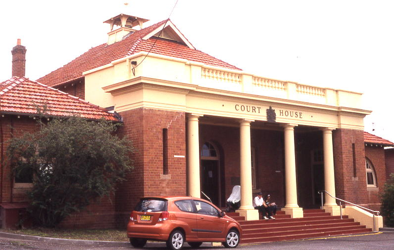 cessnock court house, australia